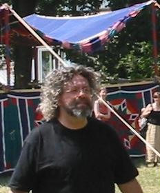 Ruediger Oppermann